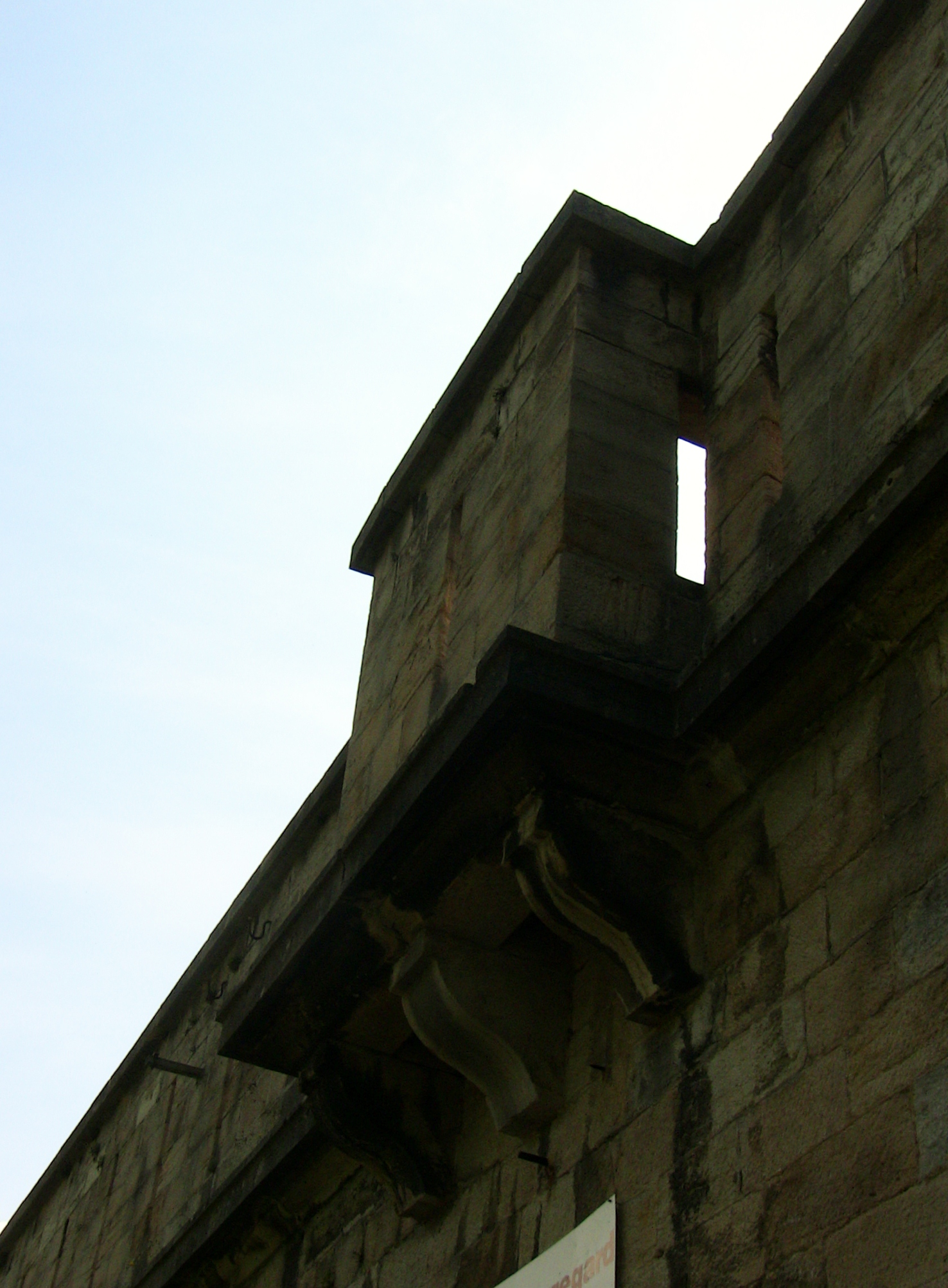 Bretèche en saillie du fort de Beauregard à Besançon (Doubs, France).